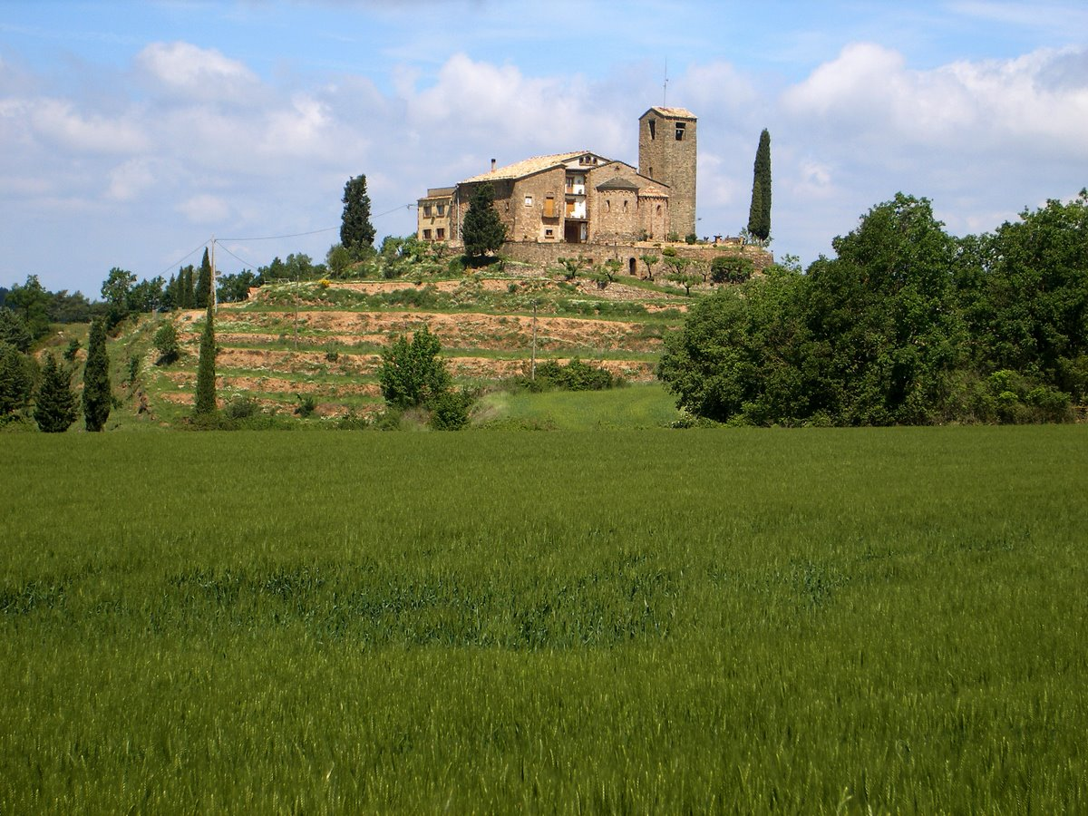 Sant Feliuet de Terrassola